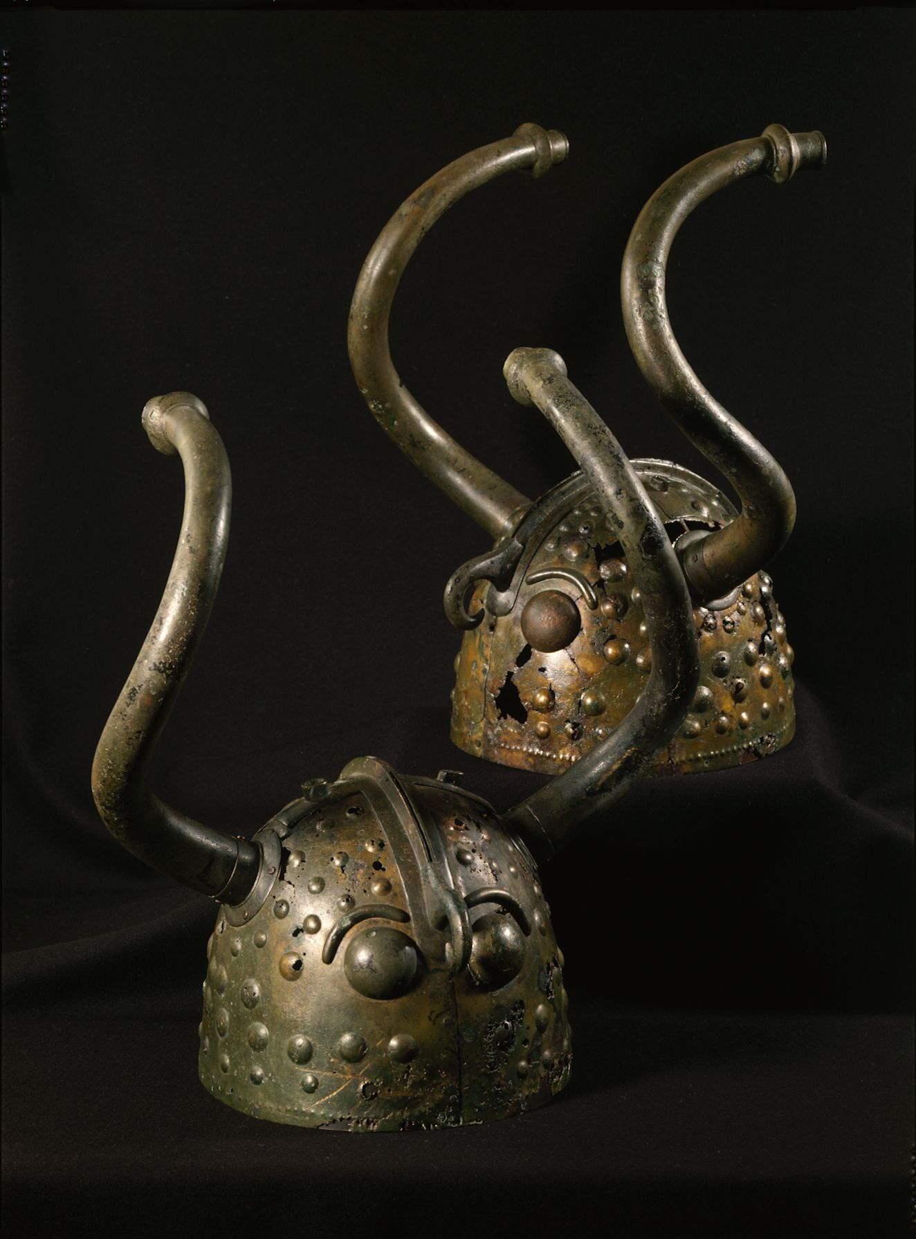 Tv.: Hjelm fra Brøns mose, Veksø sogn (B13552) Th.: Hjelm fra Brøns mose, Veksø sogn (B13553)